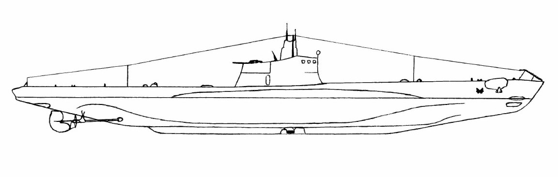 Подводный минный заградитель ВМФ Италии, период Второй мировой войны, схема.